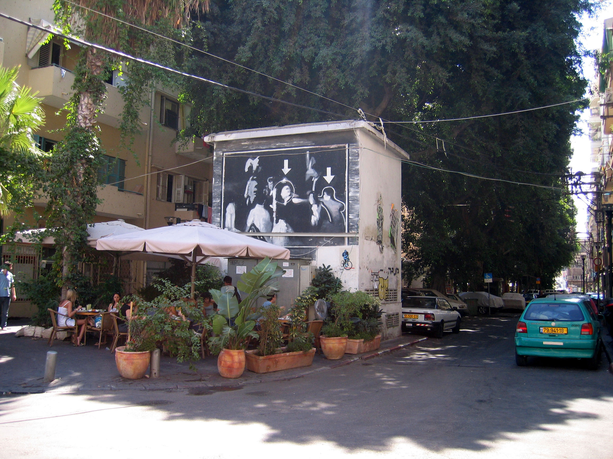 בית קפה בפינת רחוב פלורנטין ושדרות וושינגטון. על הקיר ציור המציג את רצח יצחק רבין